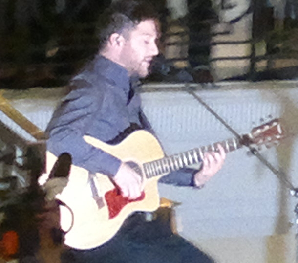 Matt Cardle